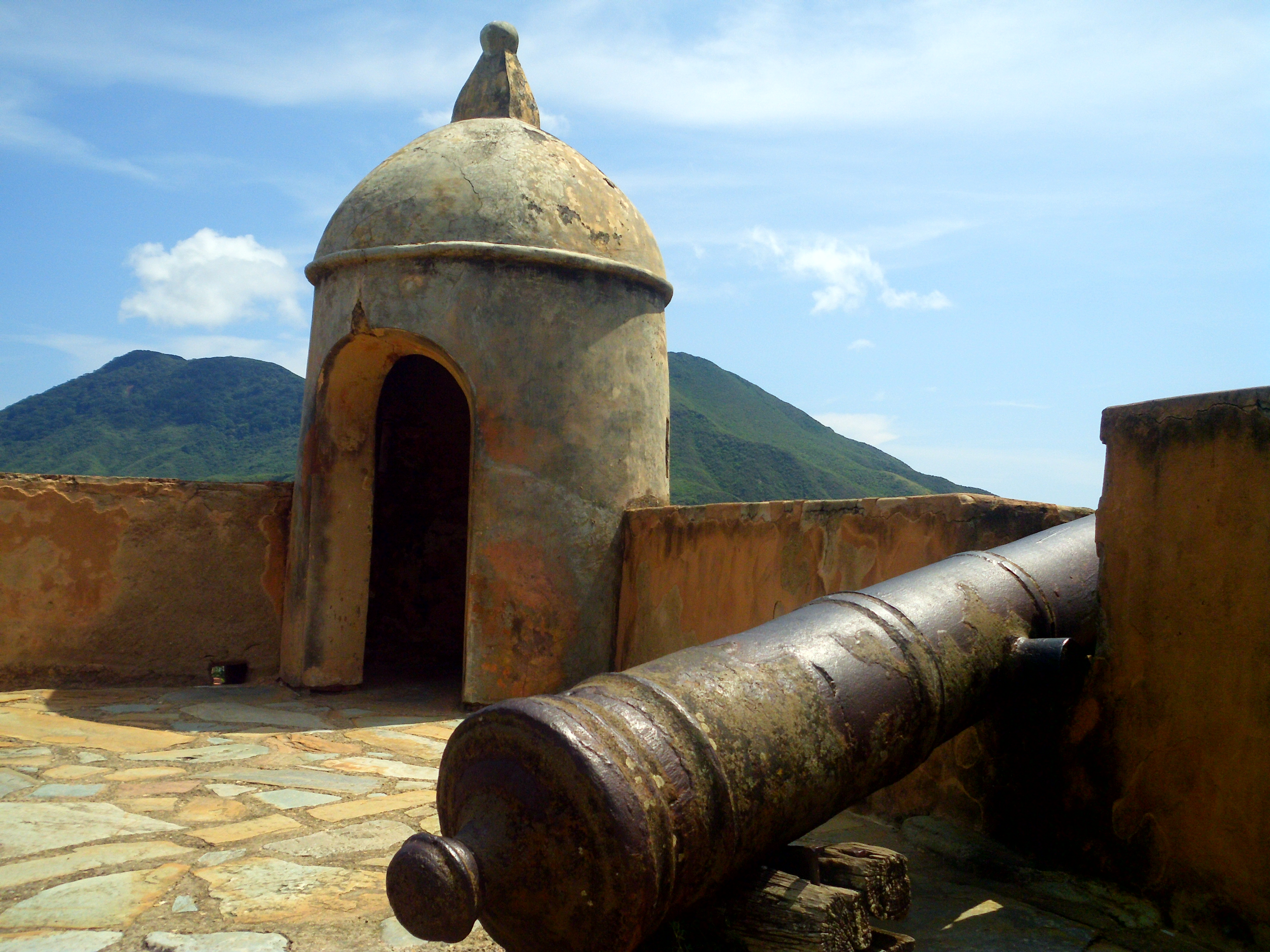 Nueva Esparta, Venezuela.